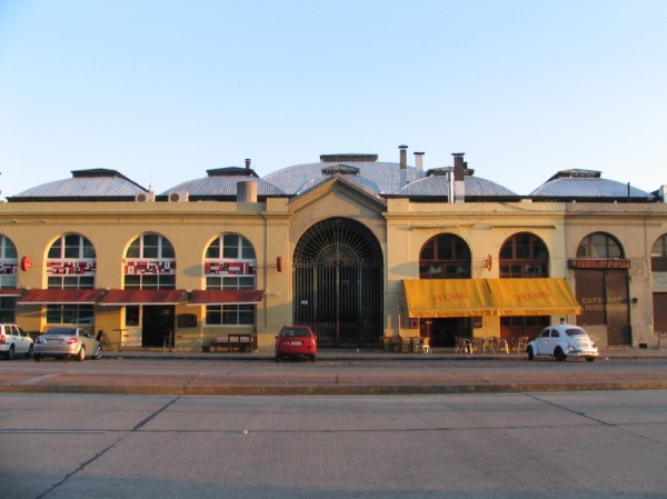 Imagen del Mercado del Puerto en Montevideo, Uruguay. Actualmente es un paseo gastronómico. Cámara Canon Powershot S1 IS - by Chinito.